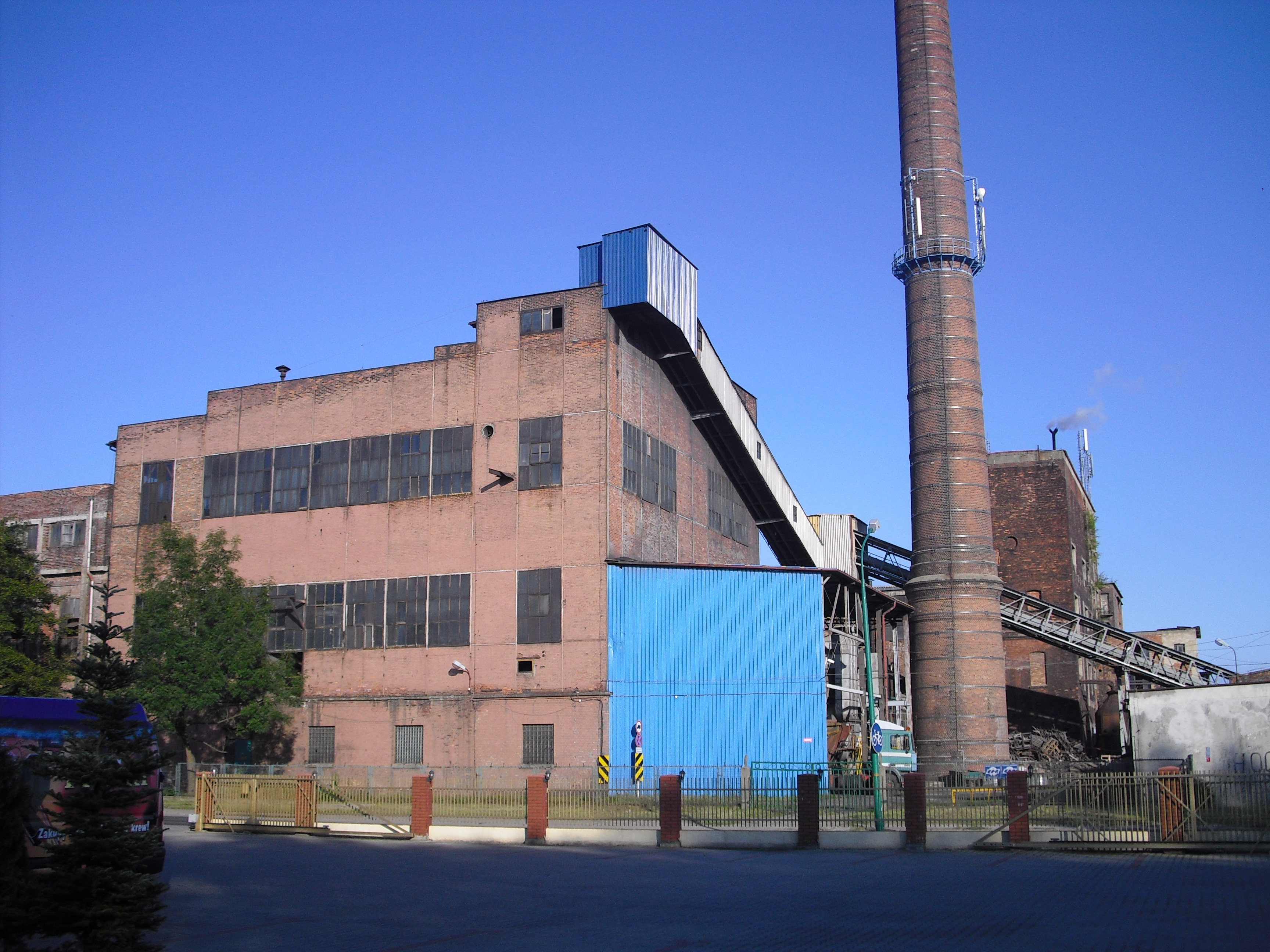 Papiernia w Czułowie (obecnie OTOR-Silesia)